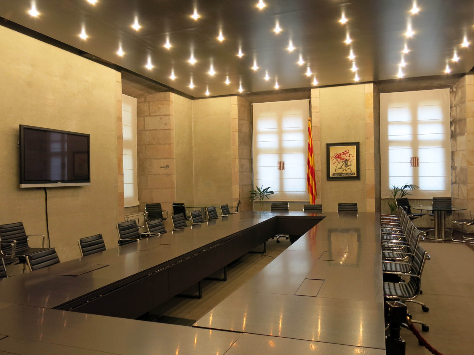 Palau de la Generalitat (Barcelona) Object location41° 22′ 58.01″ N, 2° 10′ 36.01″ E